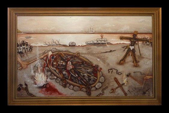 Dit is het schilderij (Executie van Tula) met illustratie van hoe Tula en zijn dappere strijders gemarteld en geëxecuteerd werden op het strand van Rif te Willemstad (Curaçao). Eerst werd het radbraken toegepast en vervolgens werden ze in het aangezicht geblakerd en daarna onthoofd en aan het eind werden hun lichamen in kleine stukken gehakt en in zee gegooid als visvoer. Dit waren gruwelijke martelmethodes uit de middeleeuwen vanuit Europa.